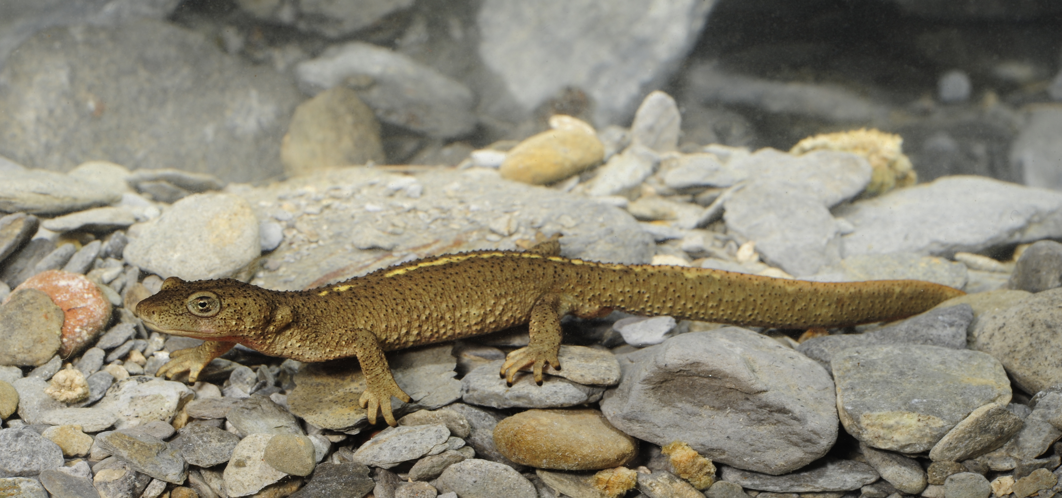 Pyrenäen-Gebirgsmolch aus Spanien